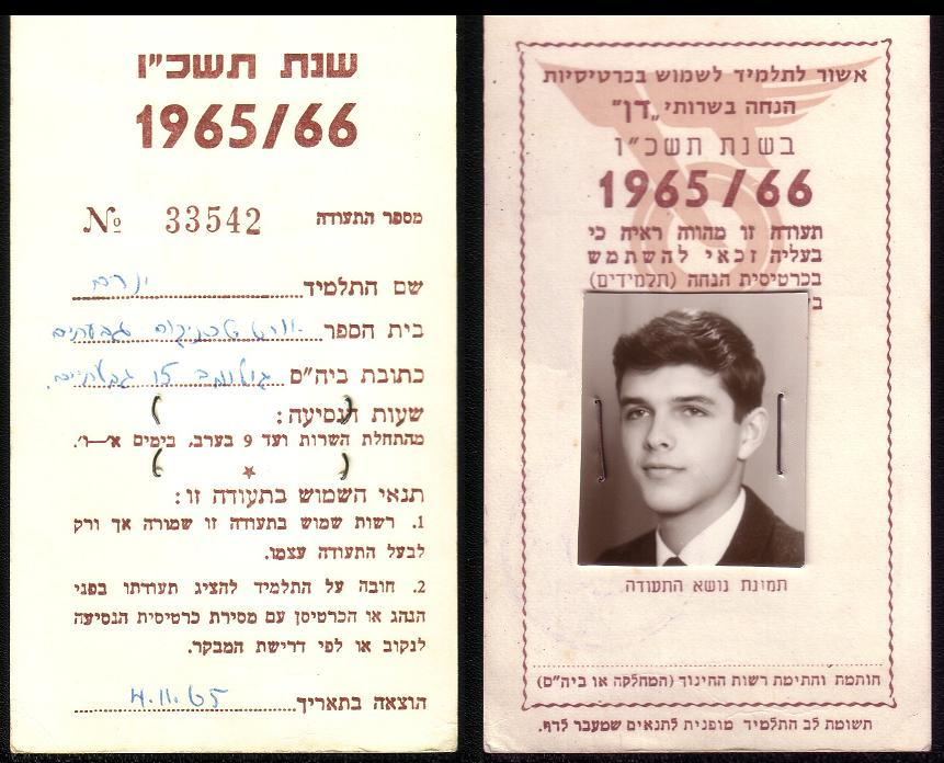 אישור לתלמיד לשימוש בכרטיסיות הנחה בשרותי דן בשנת תשכ"ו.